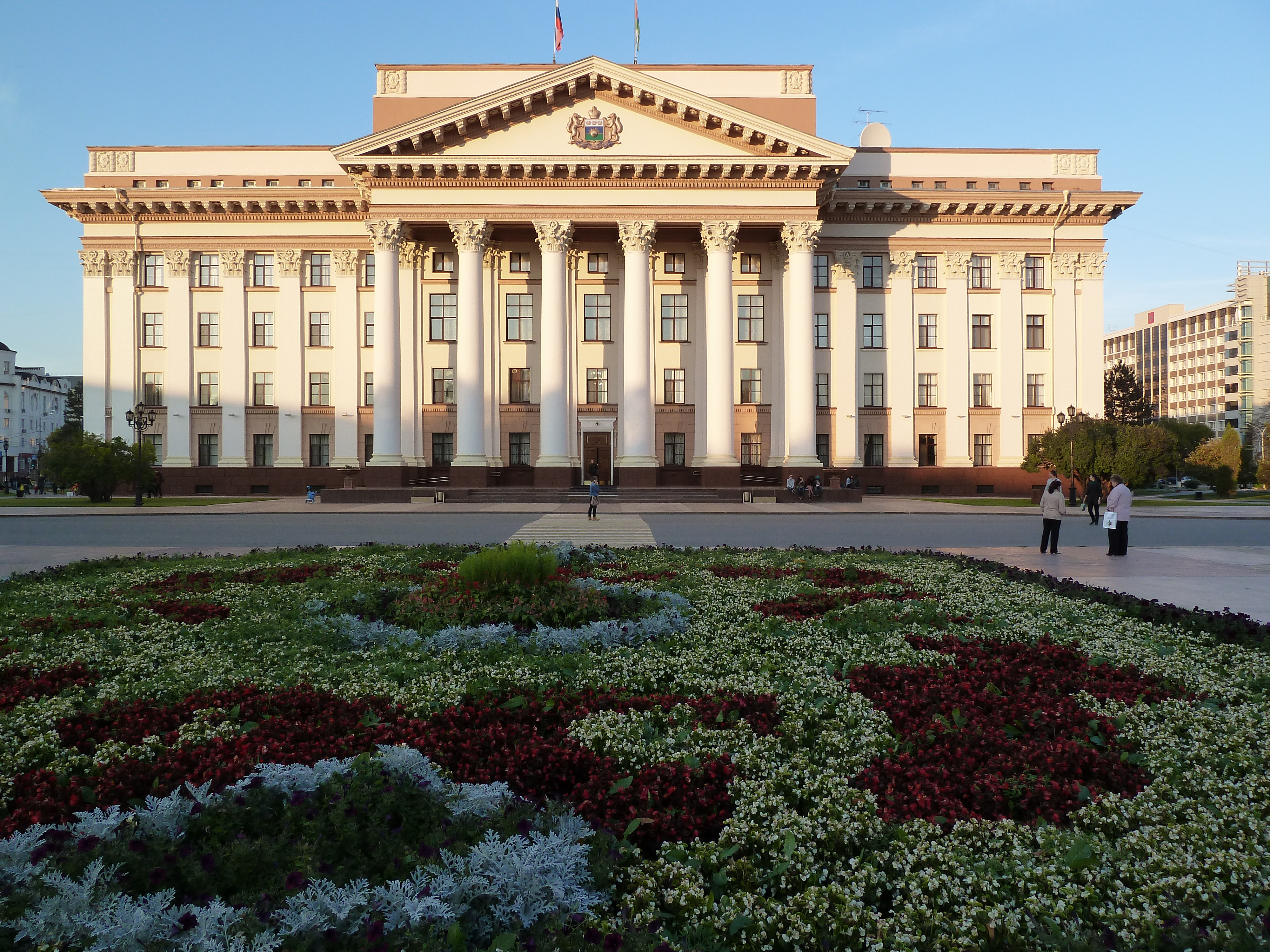 Уникальный в архитектурно-планировочном отношении образец административного здания послевоенного времени, выполненного в традициях классической ордерной архитектуры.